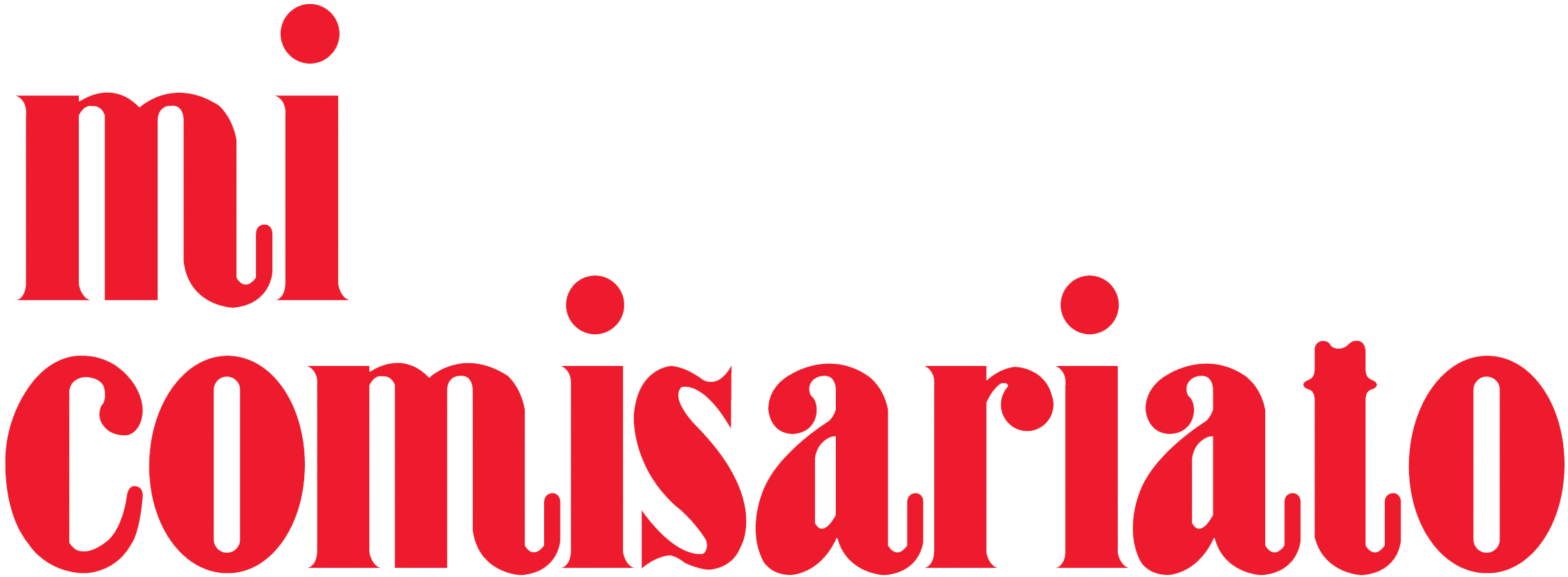 Logo de Mi Comisariato.